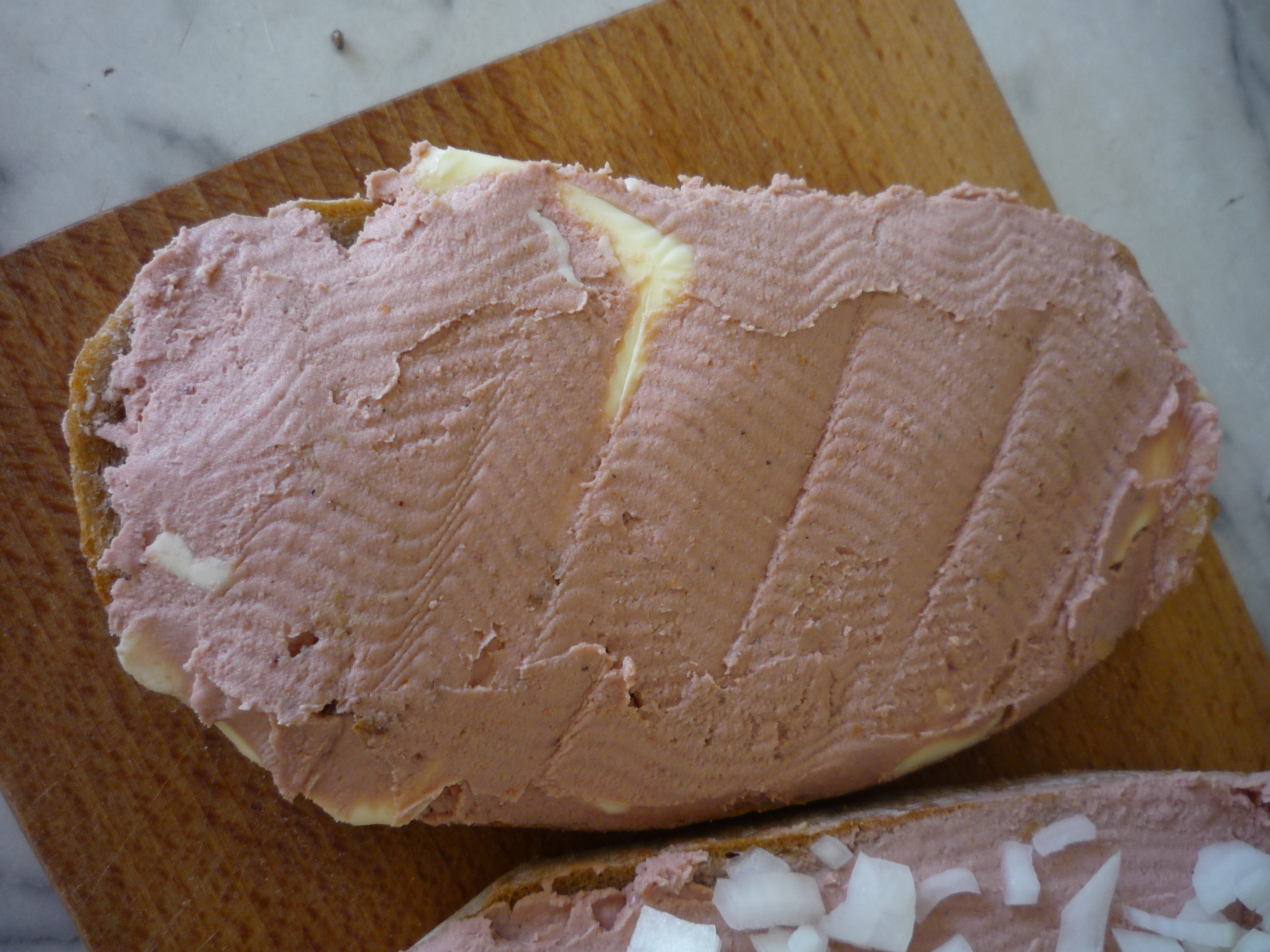 Autor fotografie Jiří Zelenka. Paštika. Základem paštiky je vařené maso. Další dělení na domácí a prodejní paštiku. Jako další určuje název paštiky přísada koření, jater (vepřové, kachní,drůbeží atd..) slaniny, mandlí, brusinek atd... Posledním dělením je obal jako plechovka, ALU krabička, alobal, sklenice atd.... Nejznámější paštika MAJKA. Czech Republic.